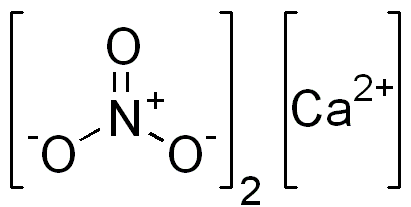 chemical structure of calcium nitrate